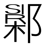 中文（香港）: 香港電影《新紮師妹》中虛構的漢字，由本人繪製。